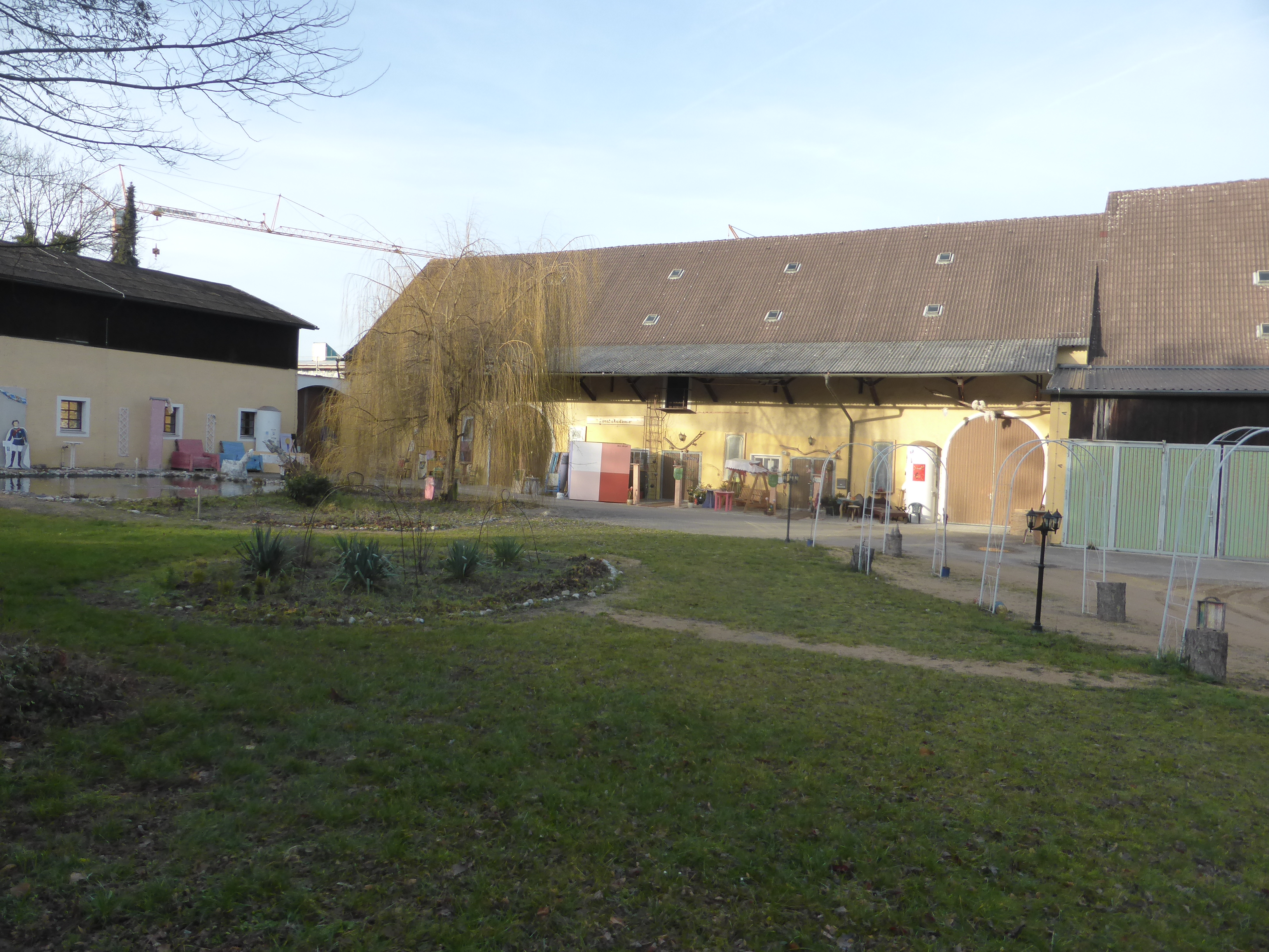 Neues Schloss Teublitz (Teublitz)